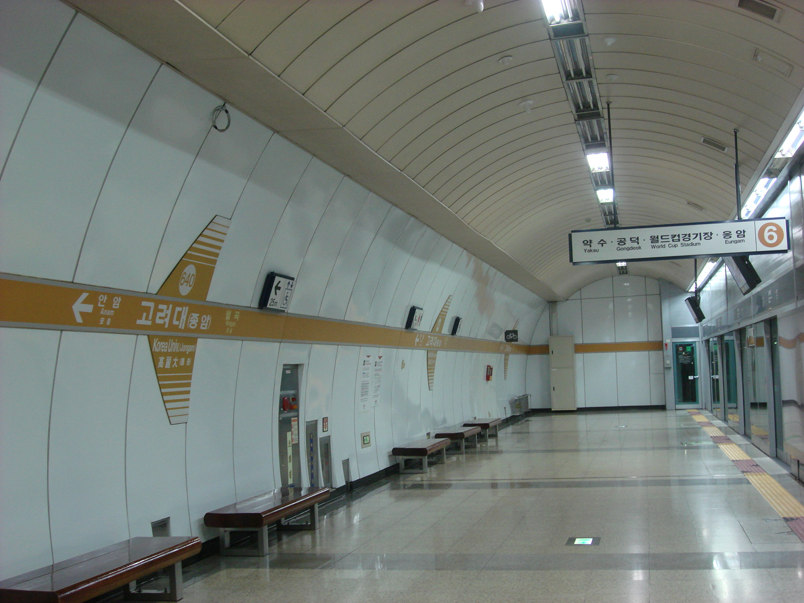 고려대역 역명판